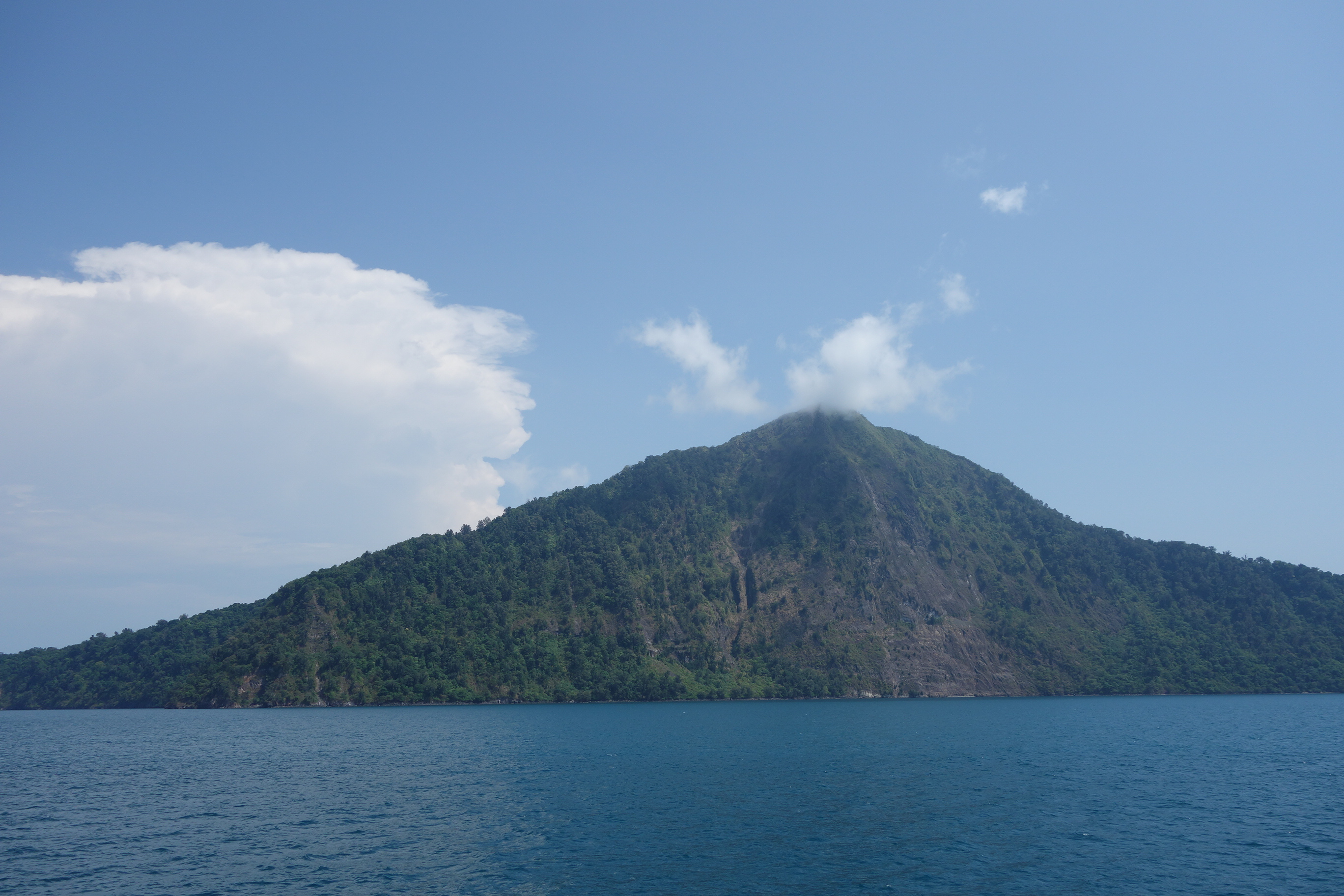 Island of Rakata, a part of Krakatau archipelago